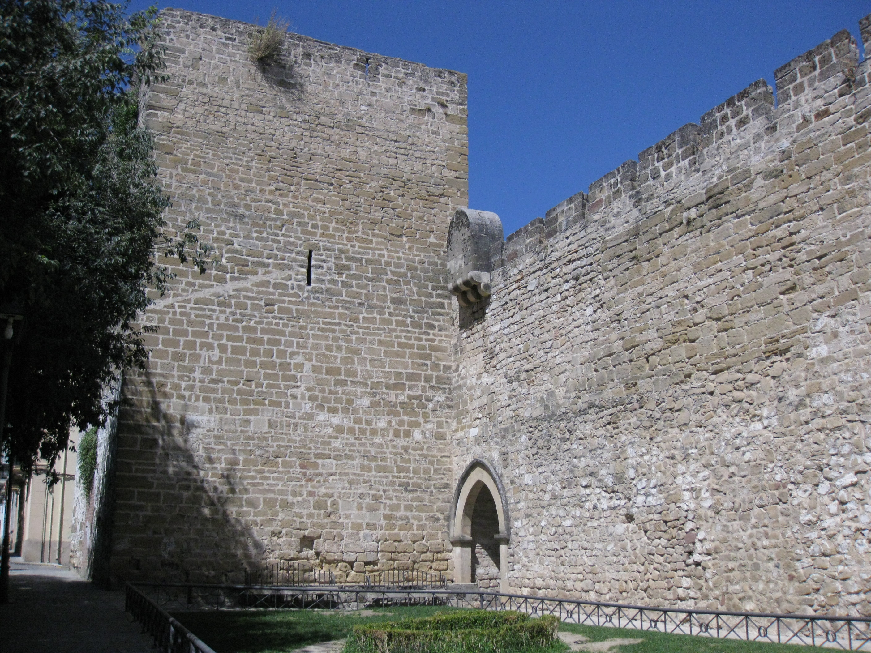 Castillo. Recinto amurallado